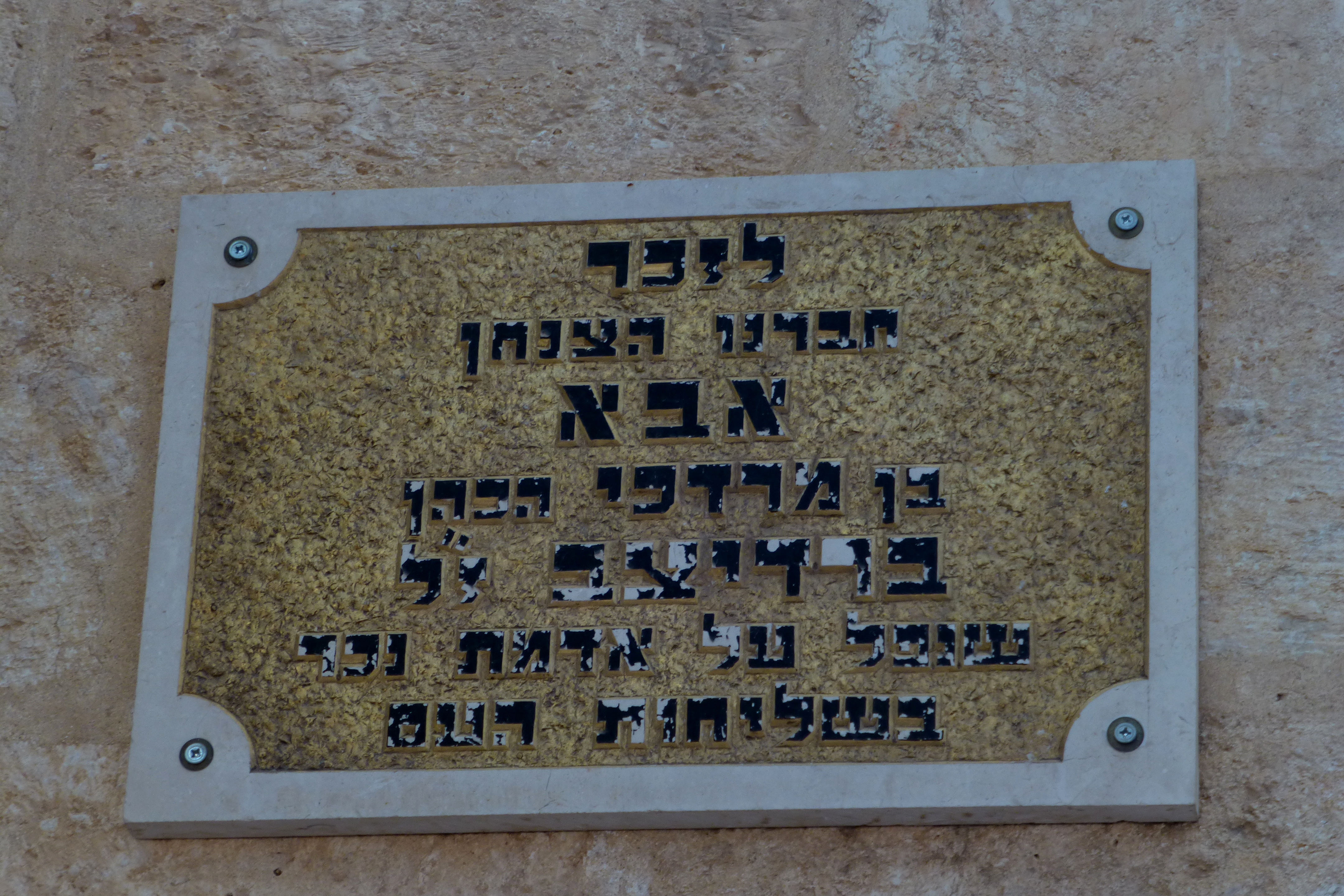 ראשוני המתיישבים באתר היישוב אלוני אבא היו בני הדור השני של תנועת הטמפלרים הגרמנים, אשר הקימו במקום בשנת 1907 מושבה חקלאית קטנה ושמה "ולדהיים".